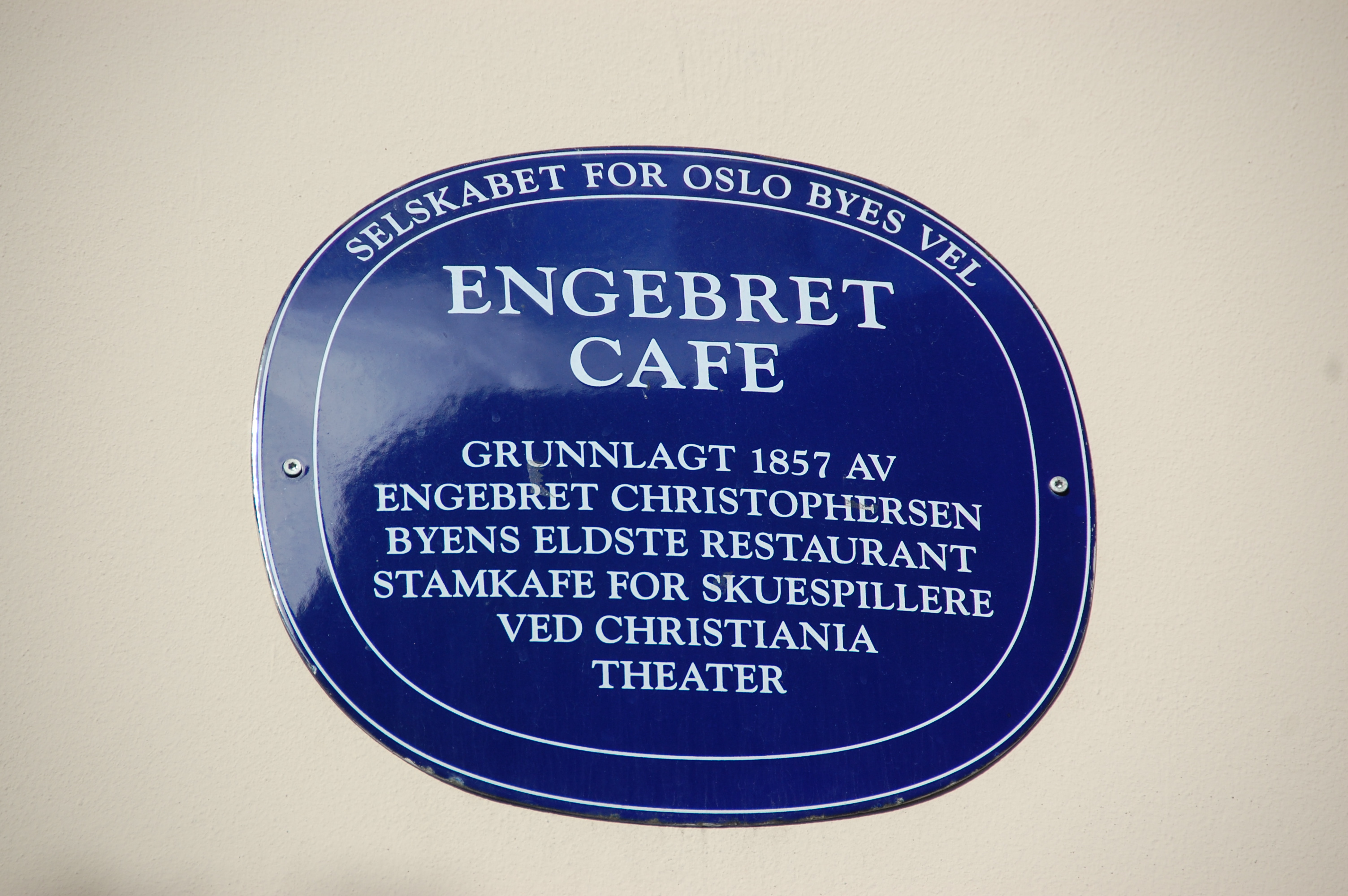 Engebret Café Kulturhistorisk skilt